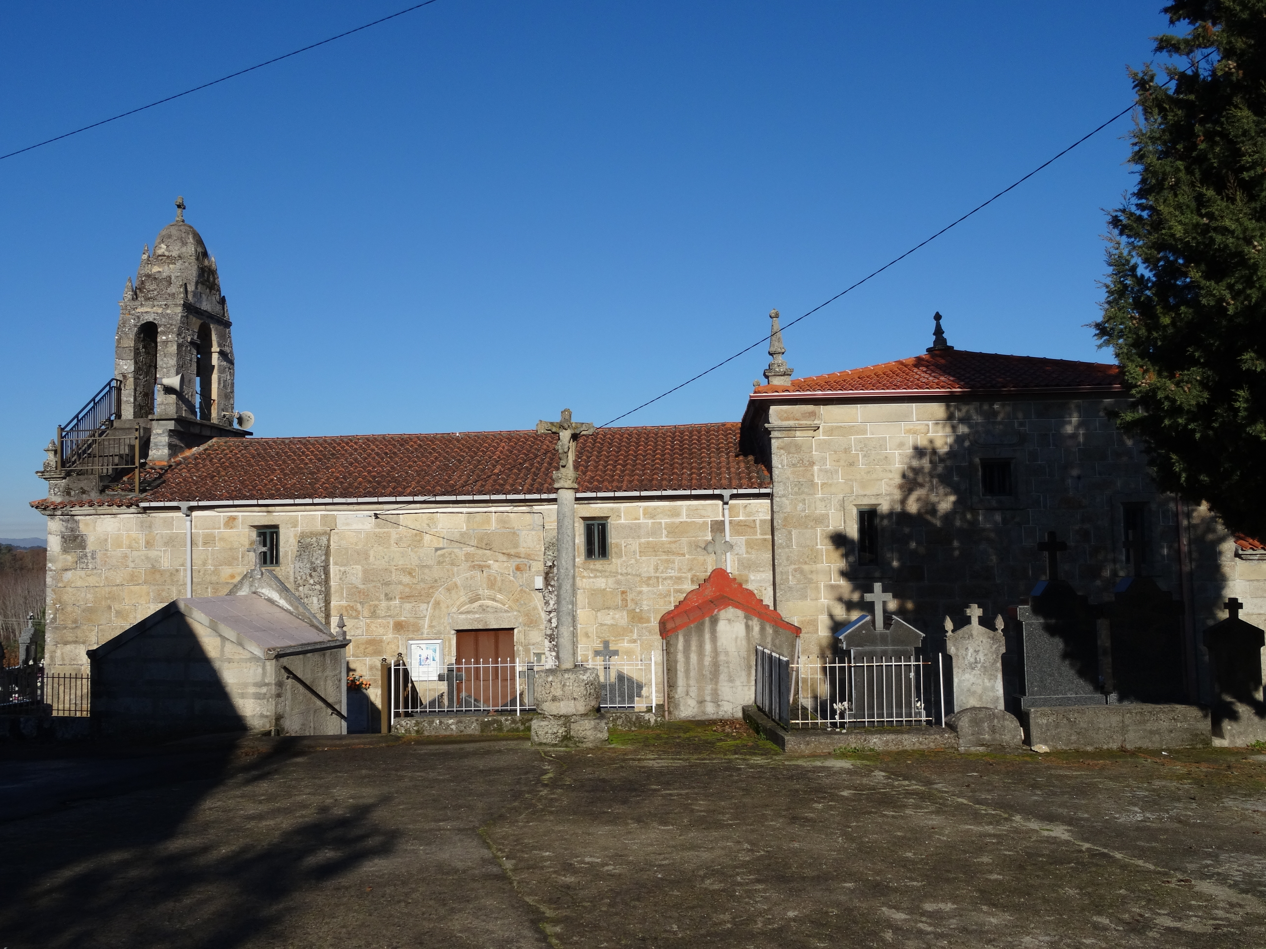 Ver título.